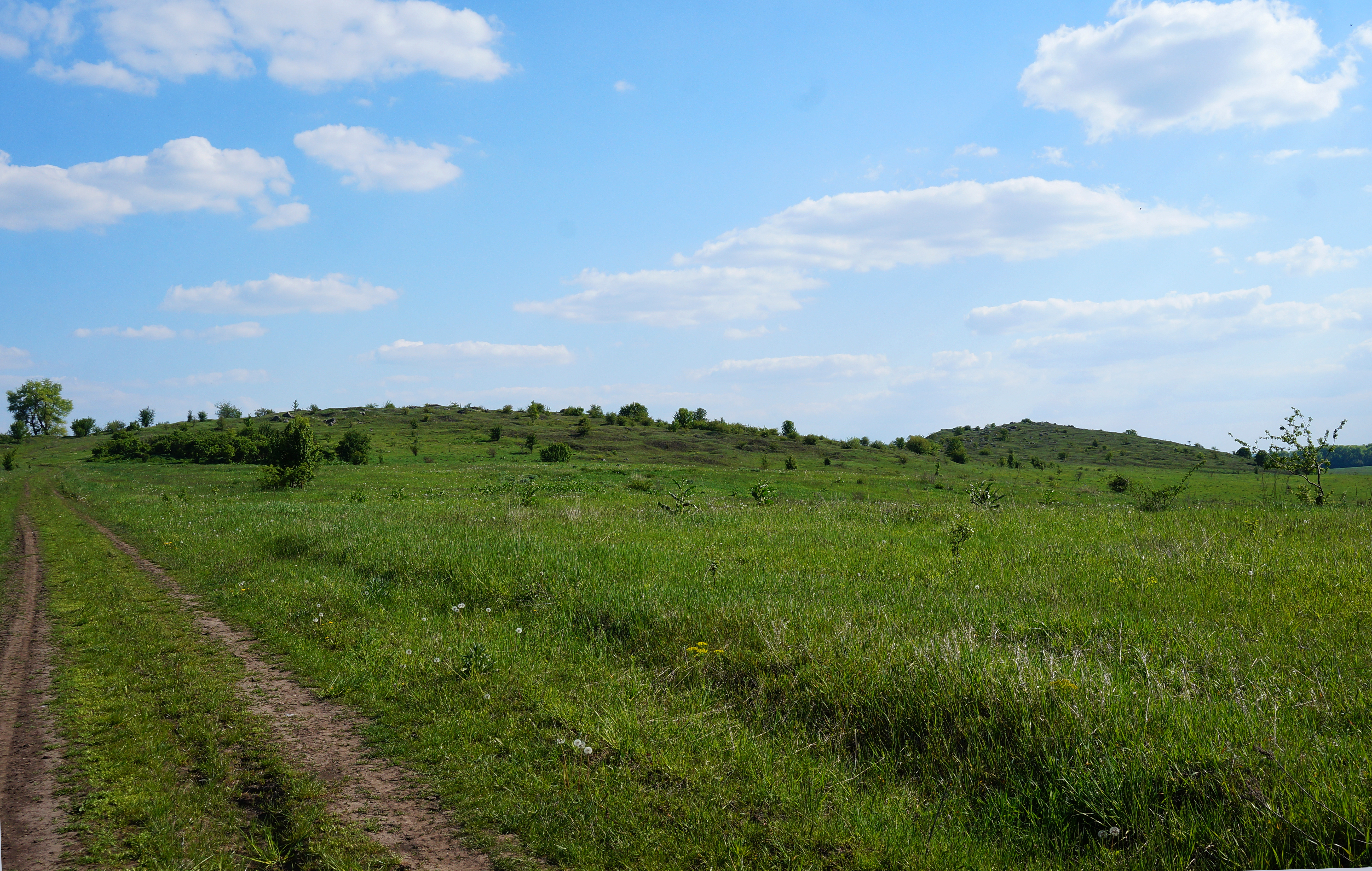 «Велике сідло», Підволочиський район, с. Полупанівка, відрога Товтрової гряди